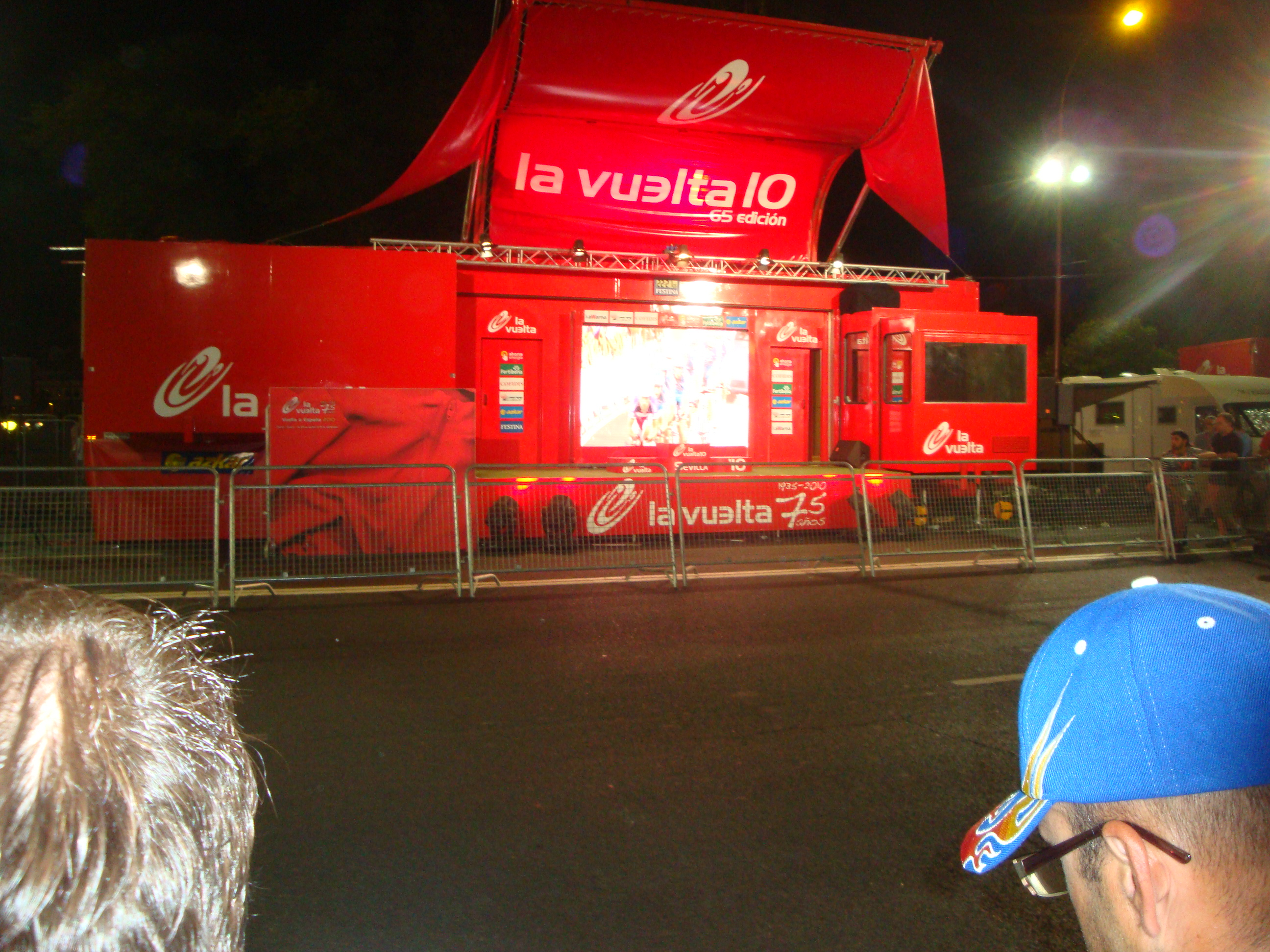 Tribuna en Sevilla de la Vuelta a España 2010